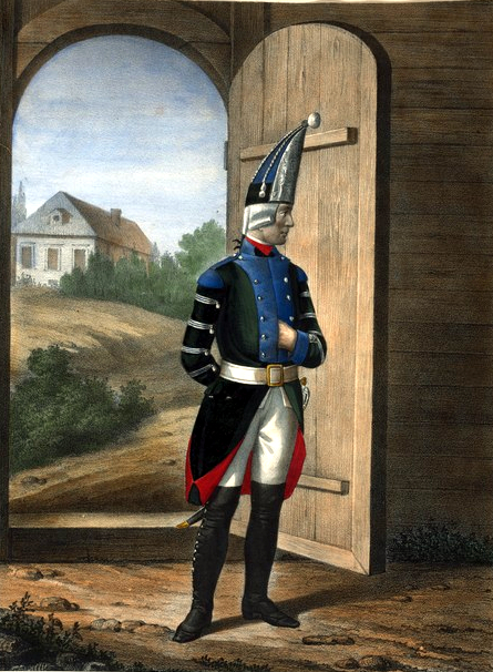 Гренадерский Барабанщик Тобольского Мушкетерского полка. 1797-1801.